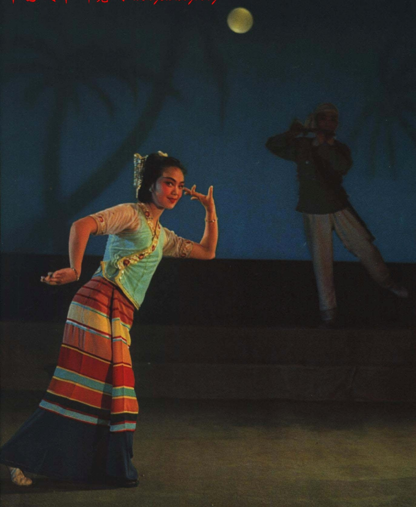 1963-05 1963年 中央歌舞团版纳月夜